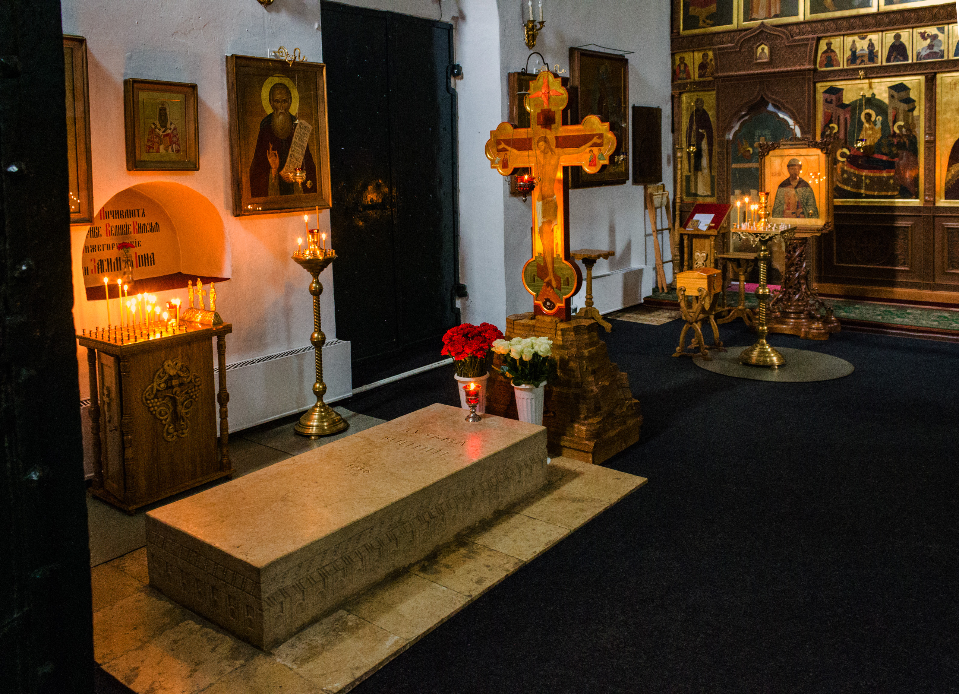 Могила Кузьмы Минина (?- 1616 ) организатора и руководителя народного ополчения в 1611-1612 г: Кремль, Минина и Пожарского площадь, Нижний Новгород, Нижегородская область